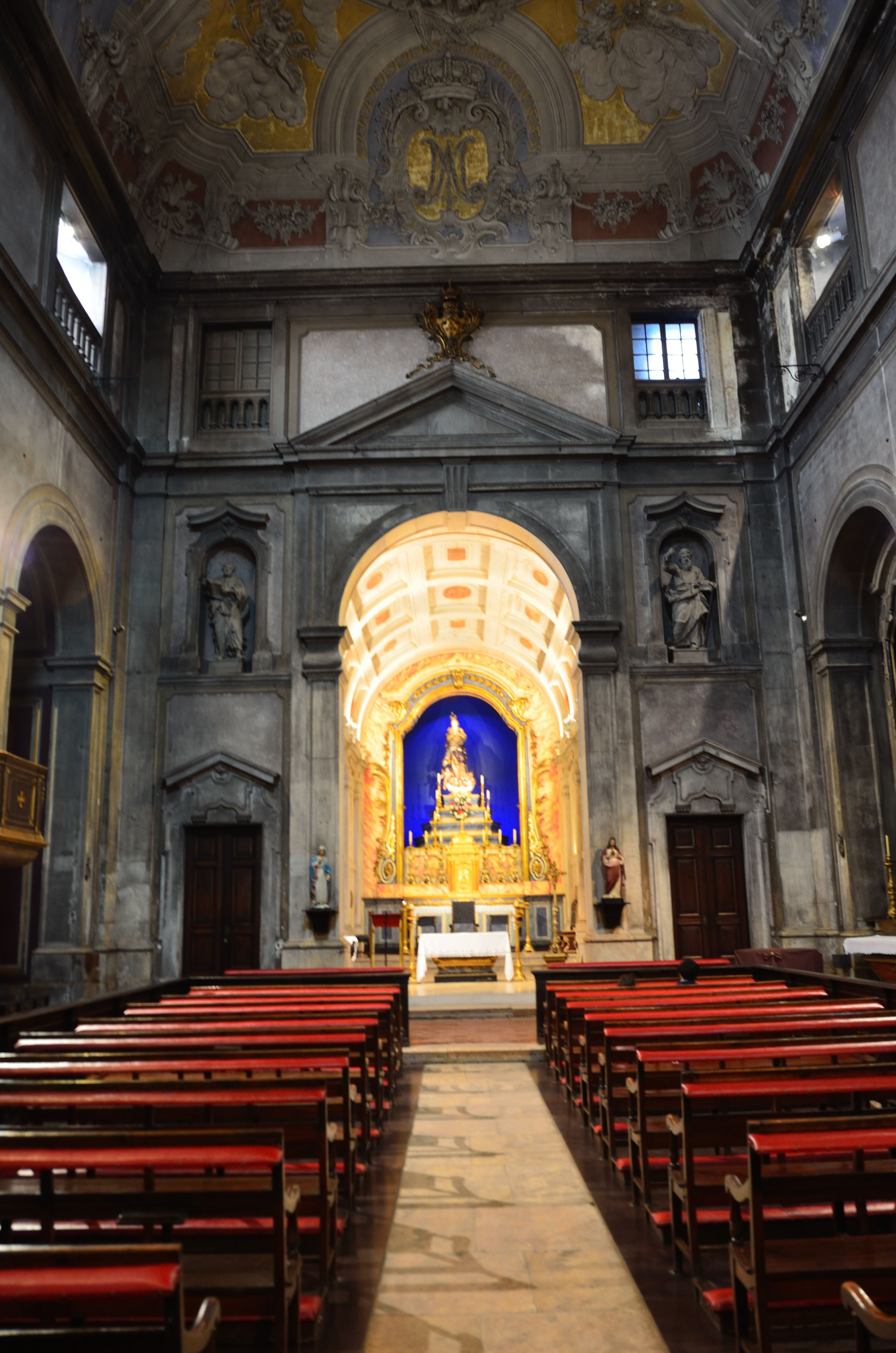 Interior da Igreja